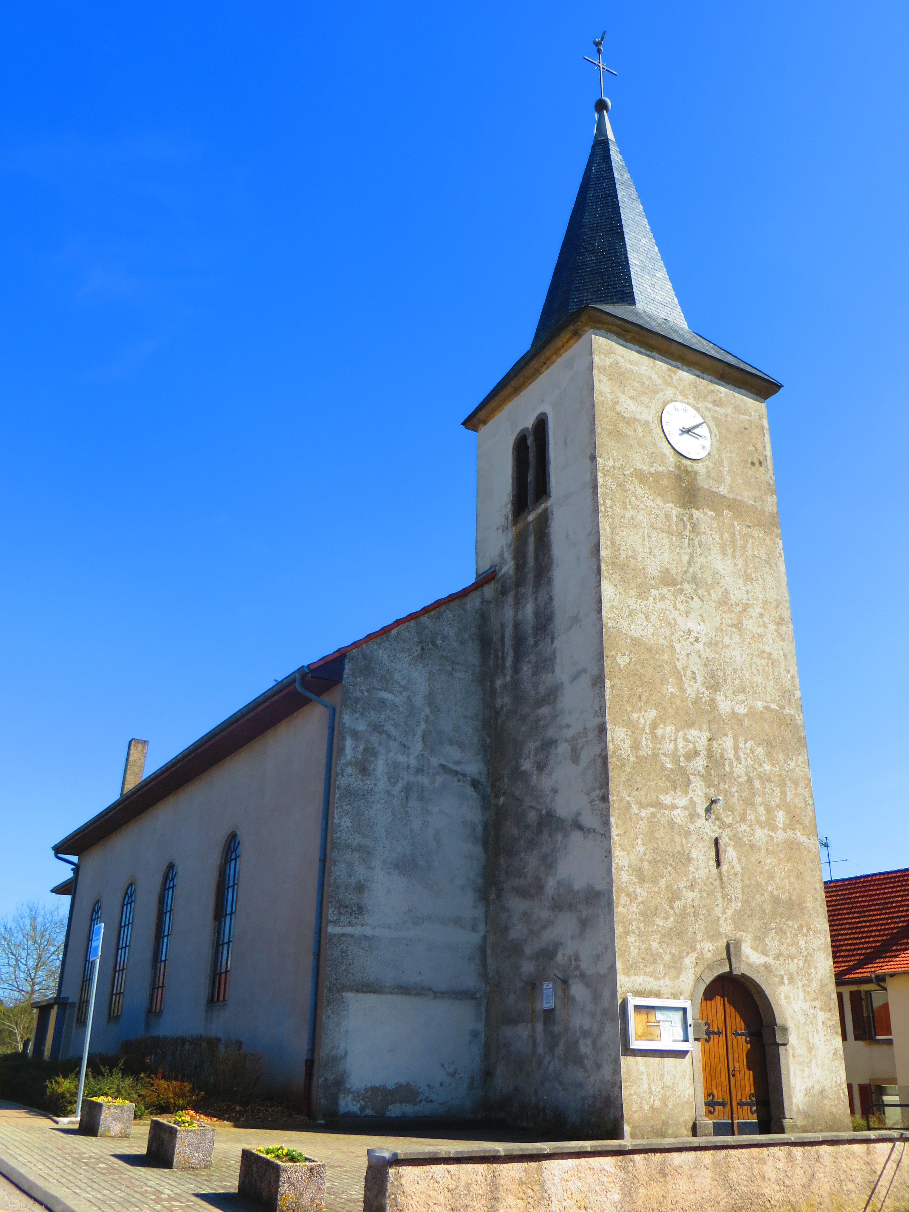 Vahl-lès-Faulquemont Église Saint-Léopold